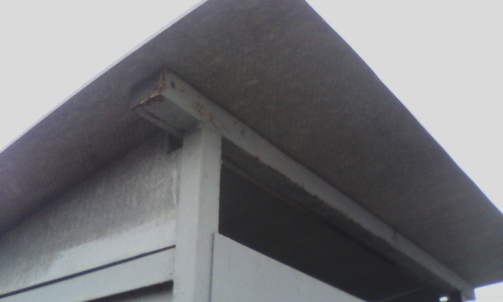 Плоский шифер из асбестоцемента толщиной 6 мм